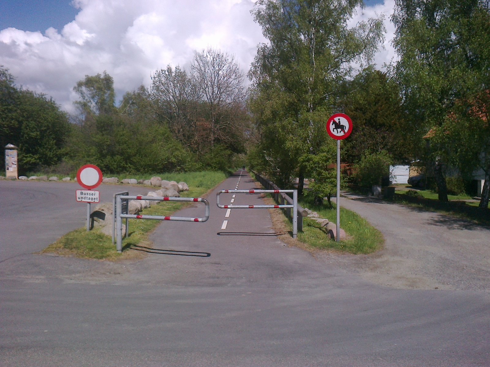 Fra Boulevarden i Balka Strand, hvor Hundsemyre trinbræt lå, starter en sti på Nexøbanens tracé til Nexø